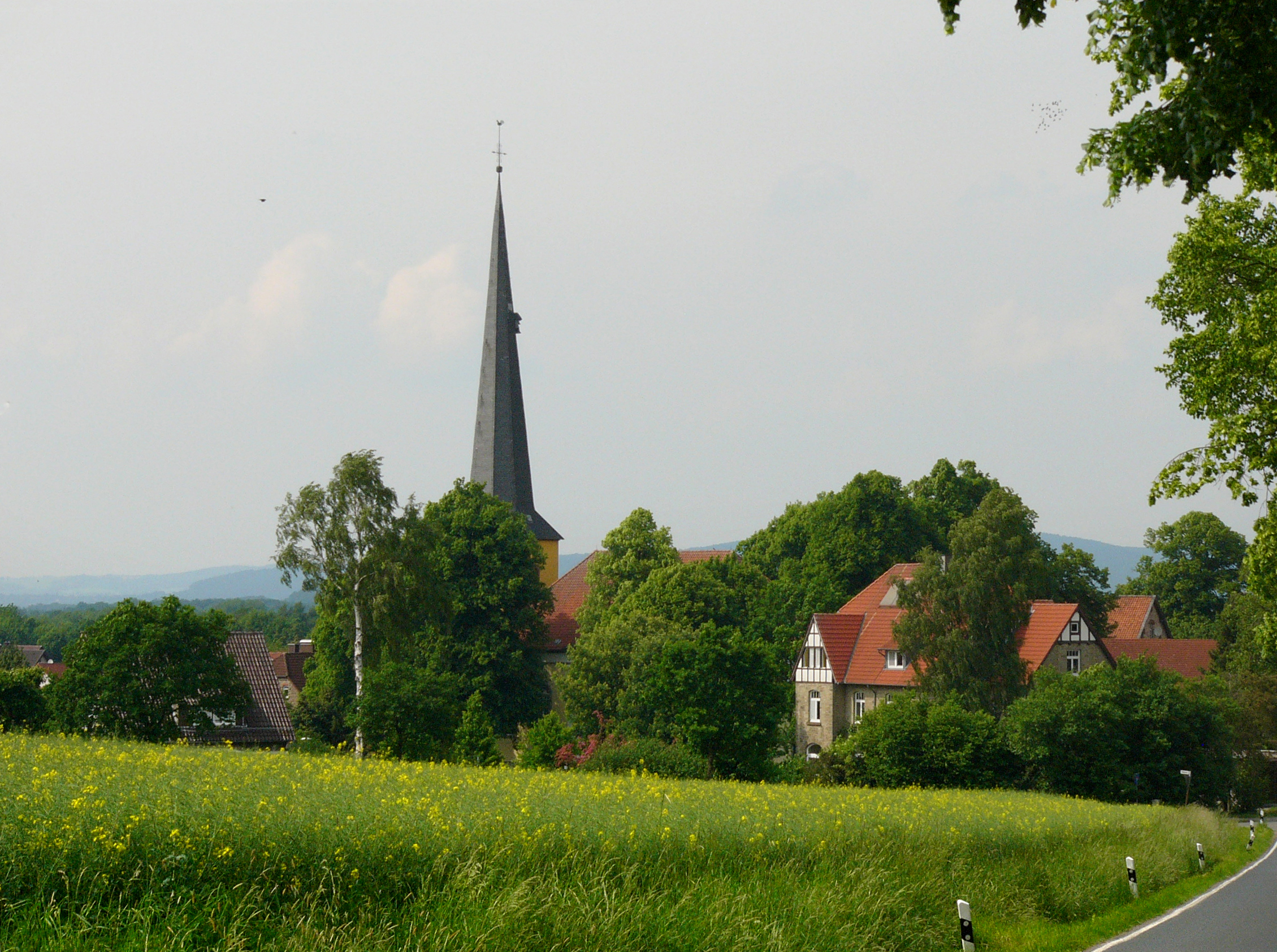 Blick auf Cappel, Ortsteil von Blomberg, Germany